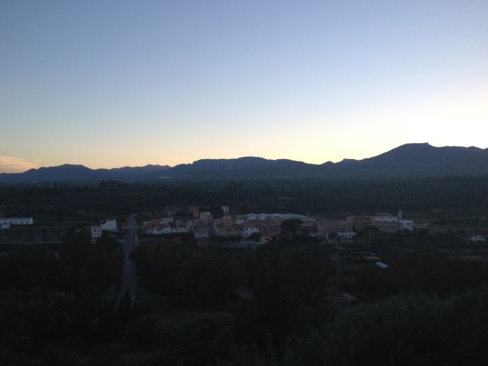 Les Cases del Riu (Baix Maestrat)